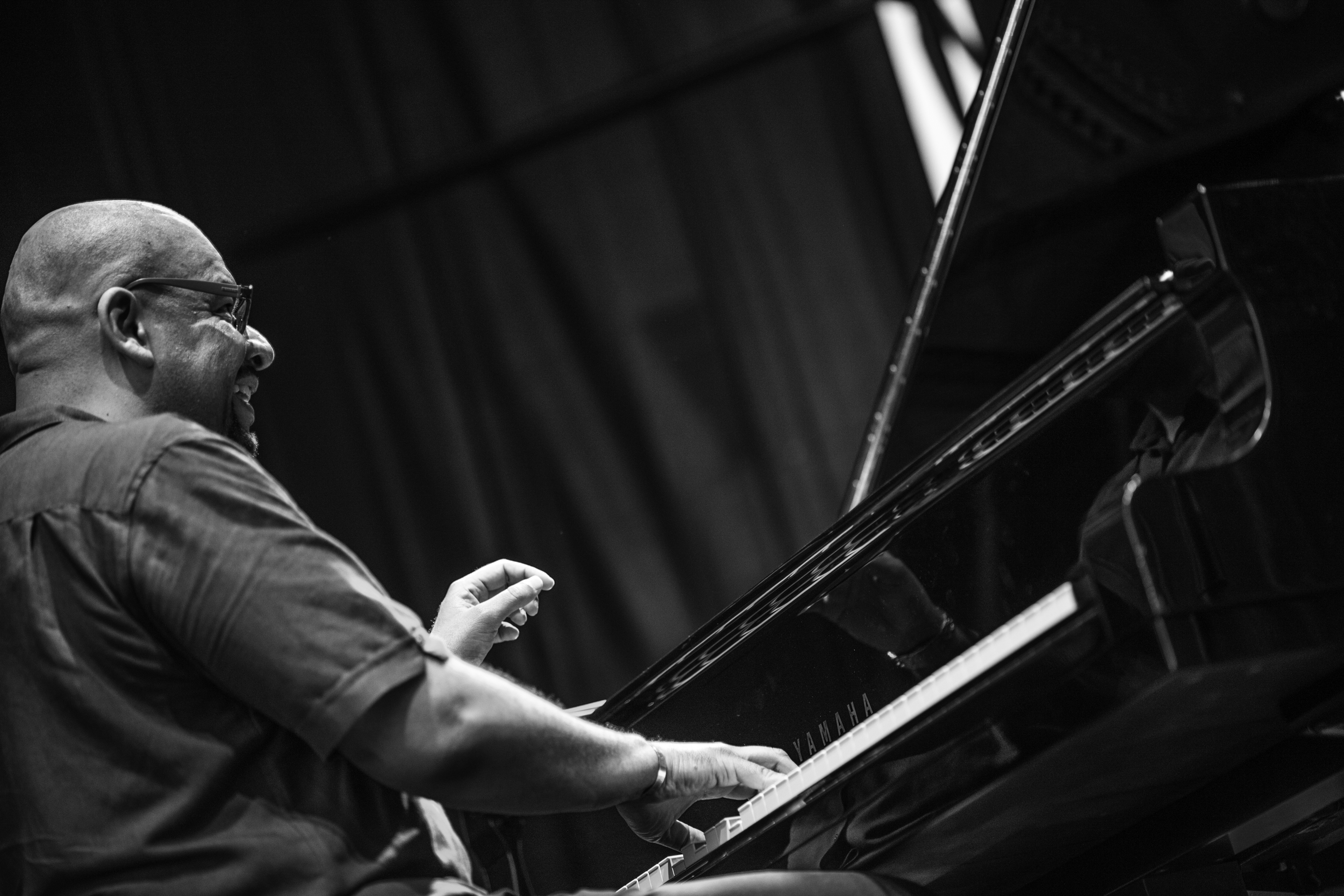 Luis Perdomo 19º FESTIVAL INTERNACIONAL DE JAZZ DE PUNTA DEL ESTE FINCA EL SOSIEGO, Maldonado, Uruguay